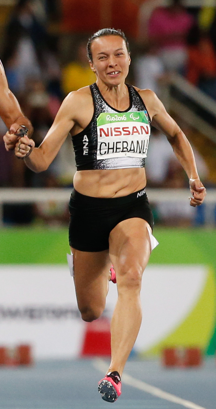 Rio de Janeiro - Elena Chebanu disputa final dos 100m T12.